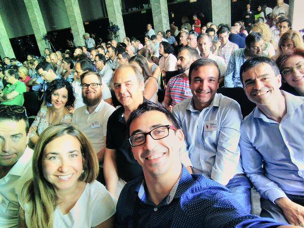 SelfieUnidos